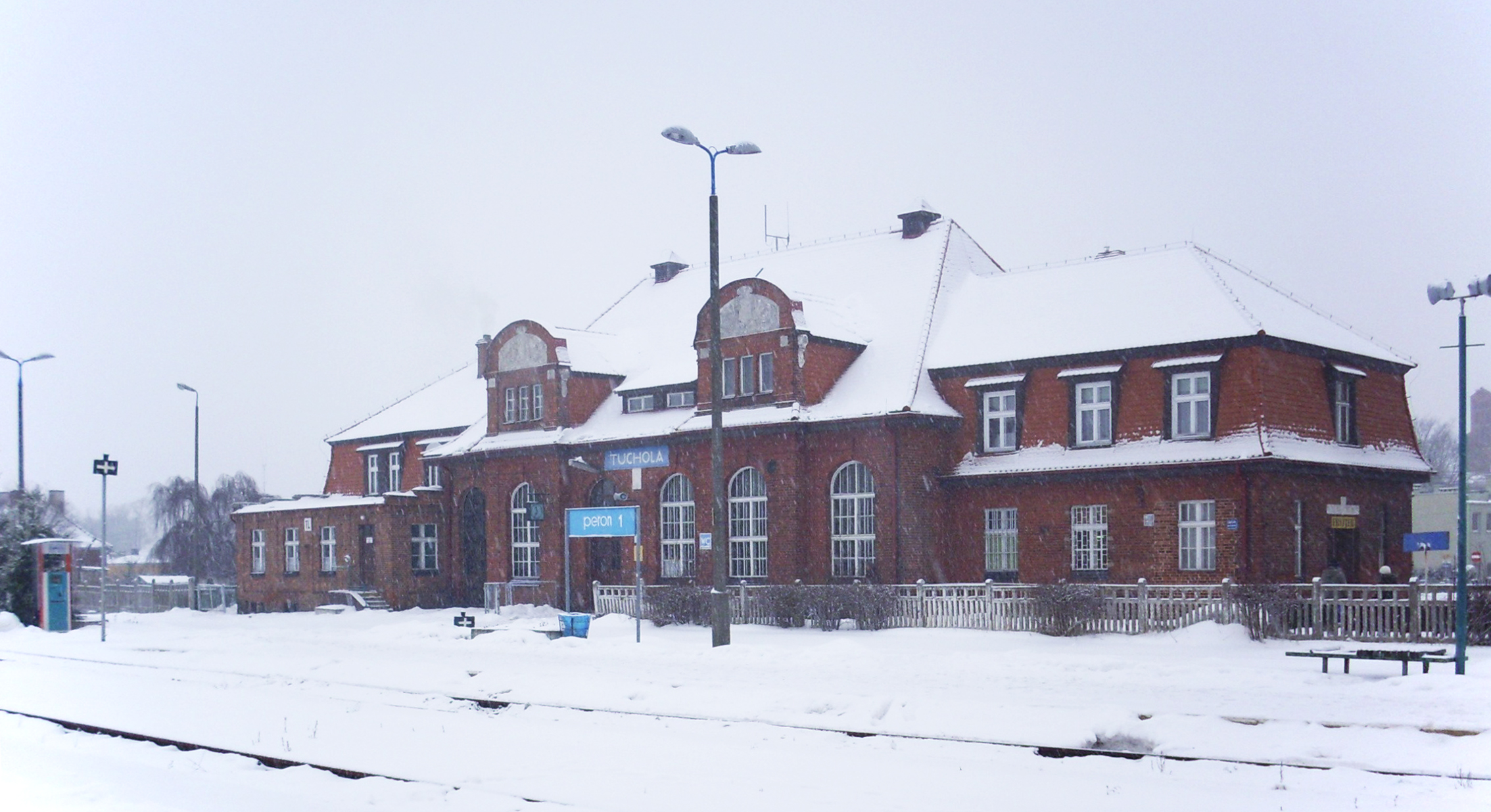 Dworzec kolejowy w Tucholi.